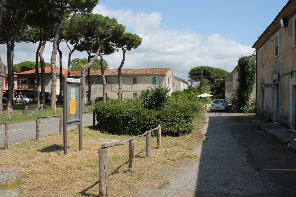 Marinella di Sarzana piazza Libertà